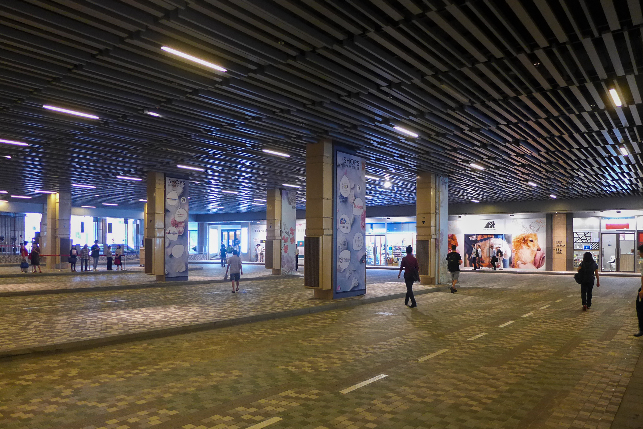 Park YOHO Bus Terminal